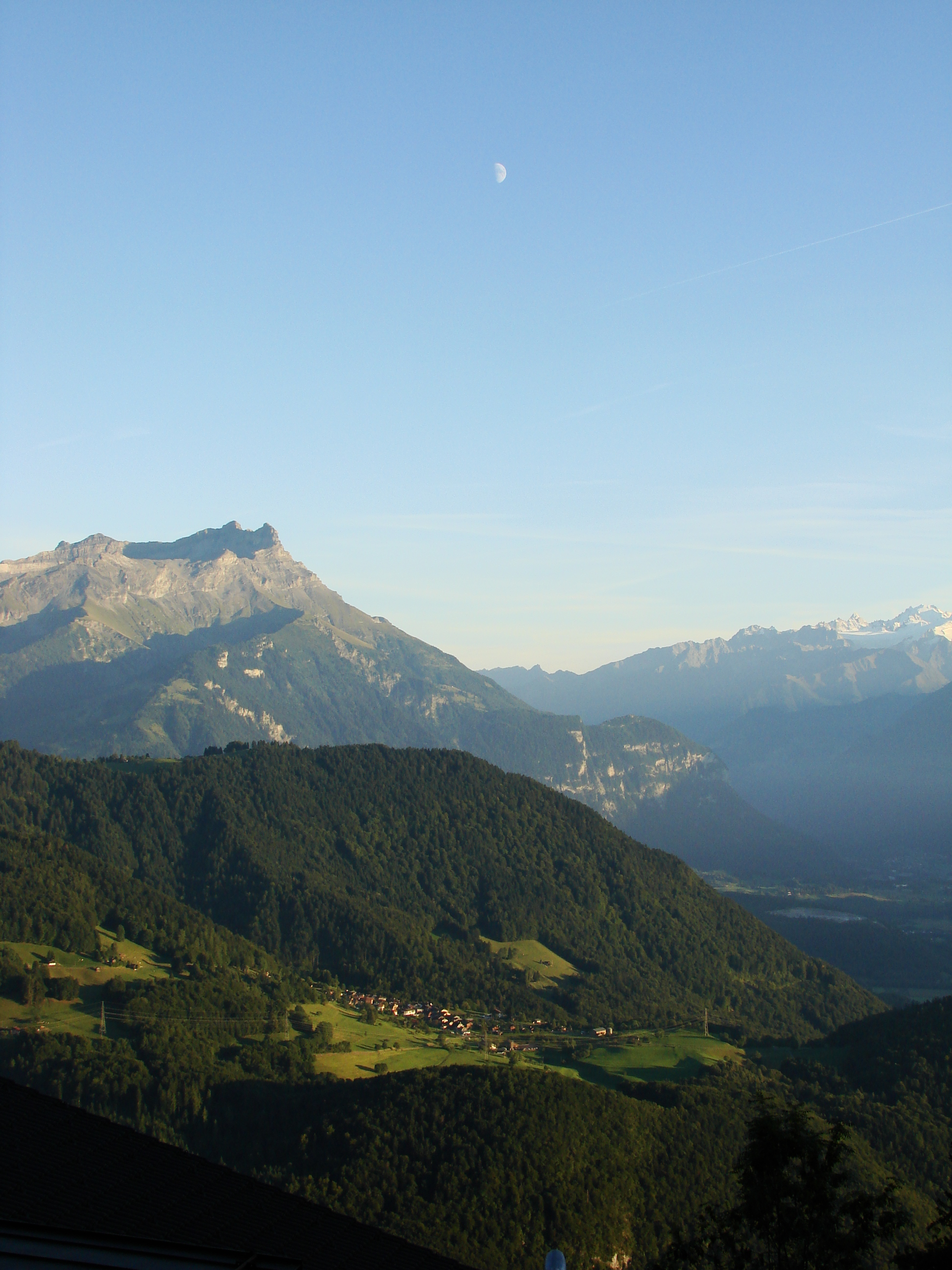 Vue de Leysin en direction de Panex (Ollon) et des Dents de Morcles